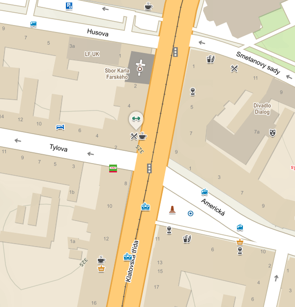 Výřez turistické mapy zachycující křižovatku U Práce v centru města Plzně.